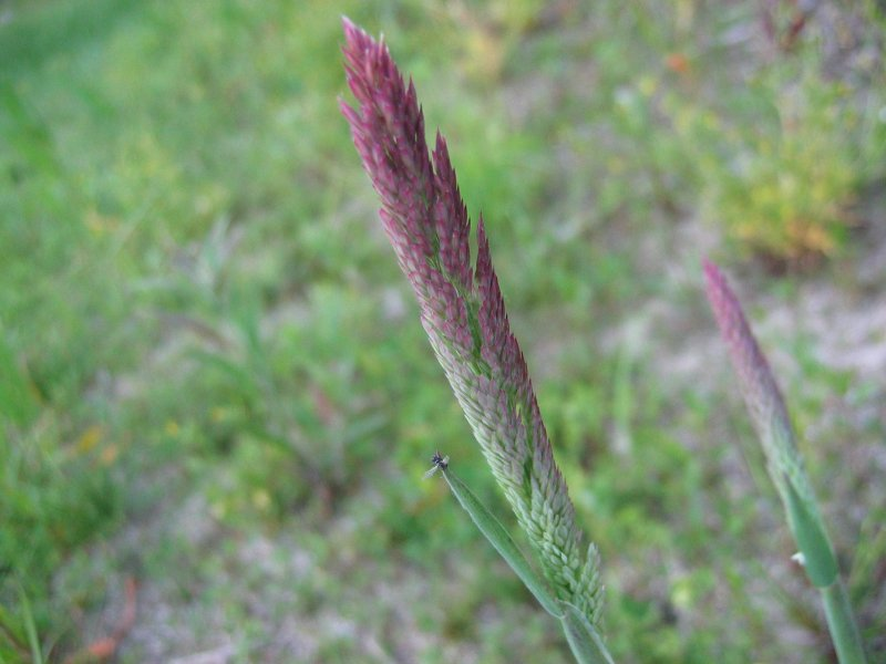 Wolliges Honiggras Holcus lanatus